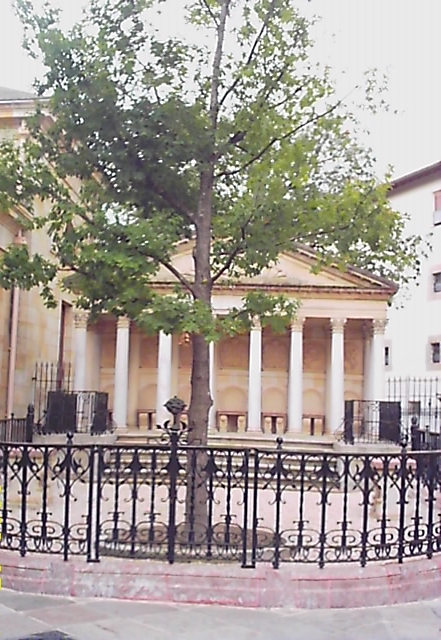 Arbre de Guernica en août 2006.